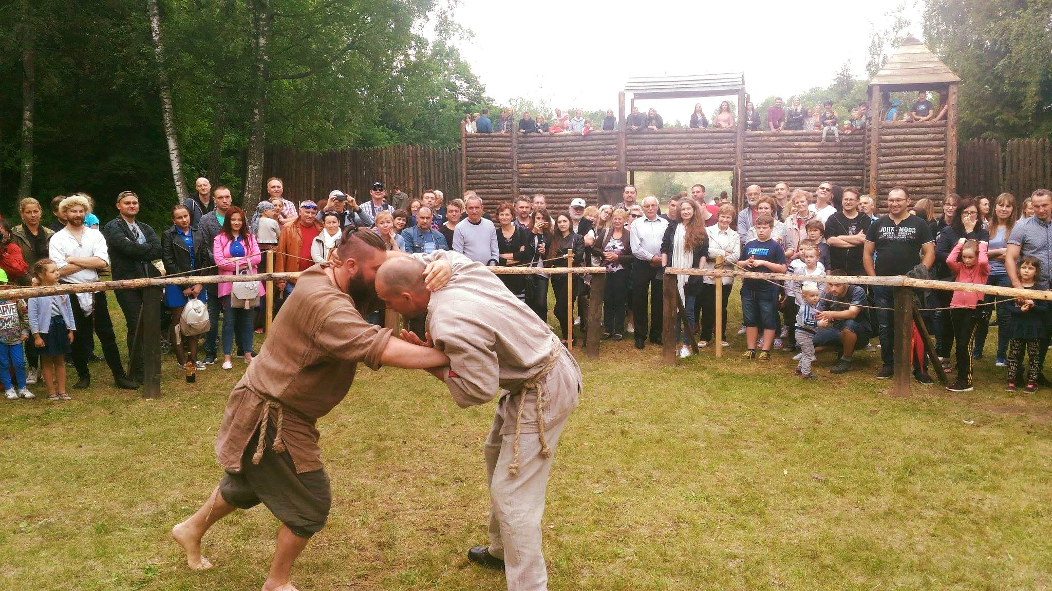 Parodomoji programa istorinės rekonstrukcijos festivalyje "Jotvos Vartai"